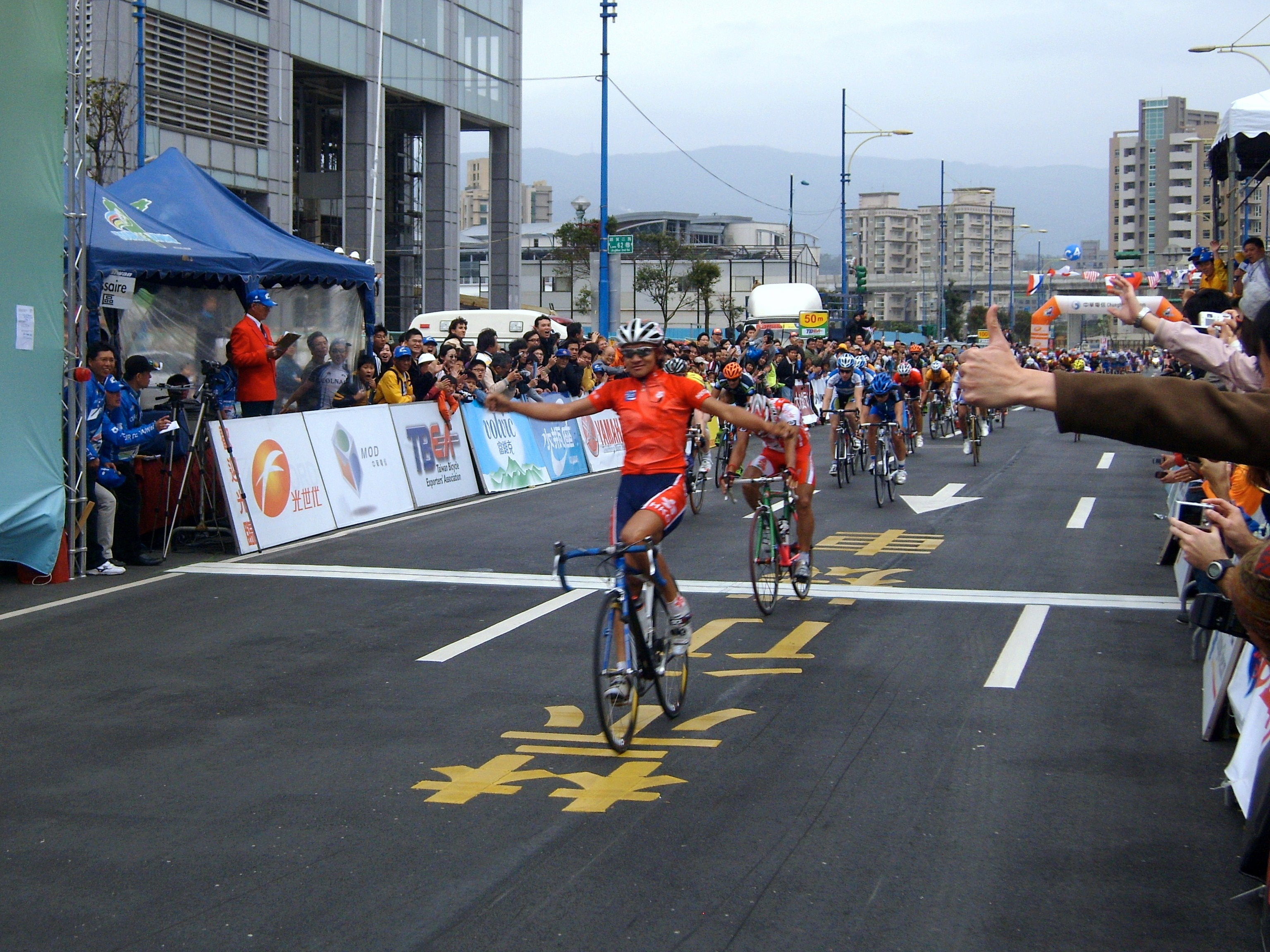 2008 Tour de Taiwan TWTC Nangang Stage: Finishing Limit